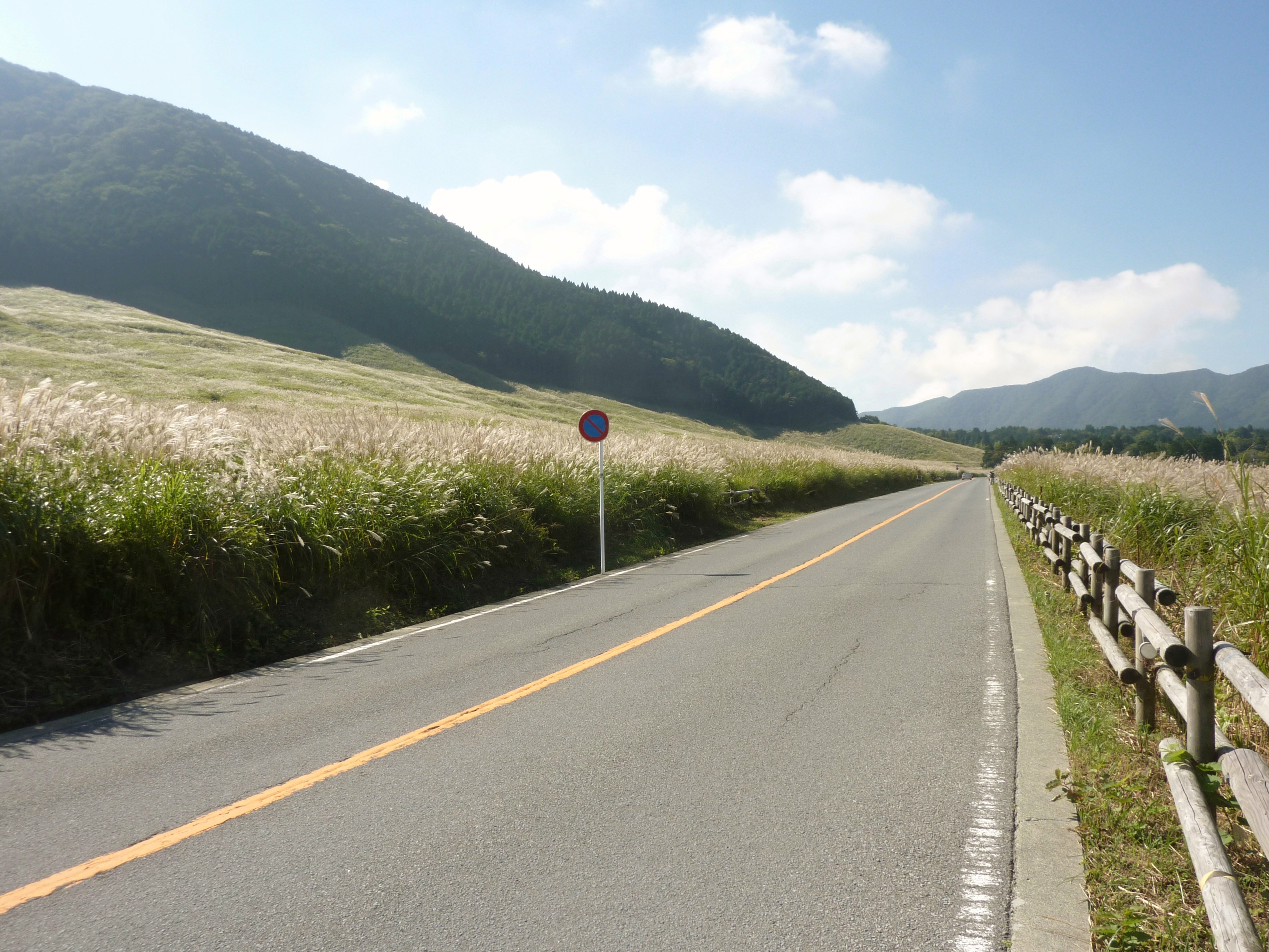 仙石原を通る県道75号（神奈川県箱根町）